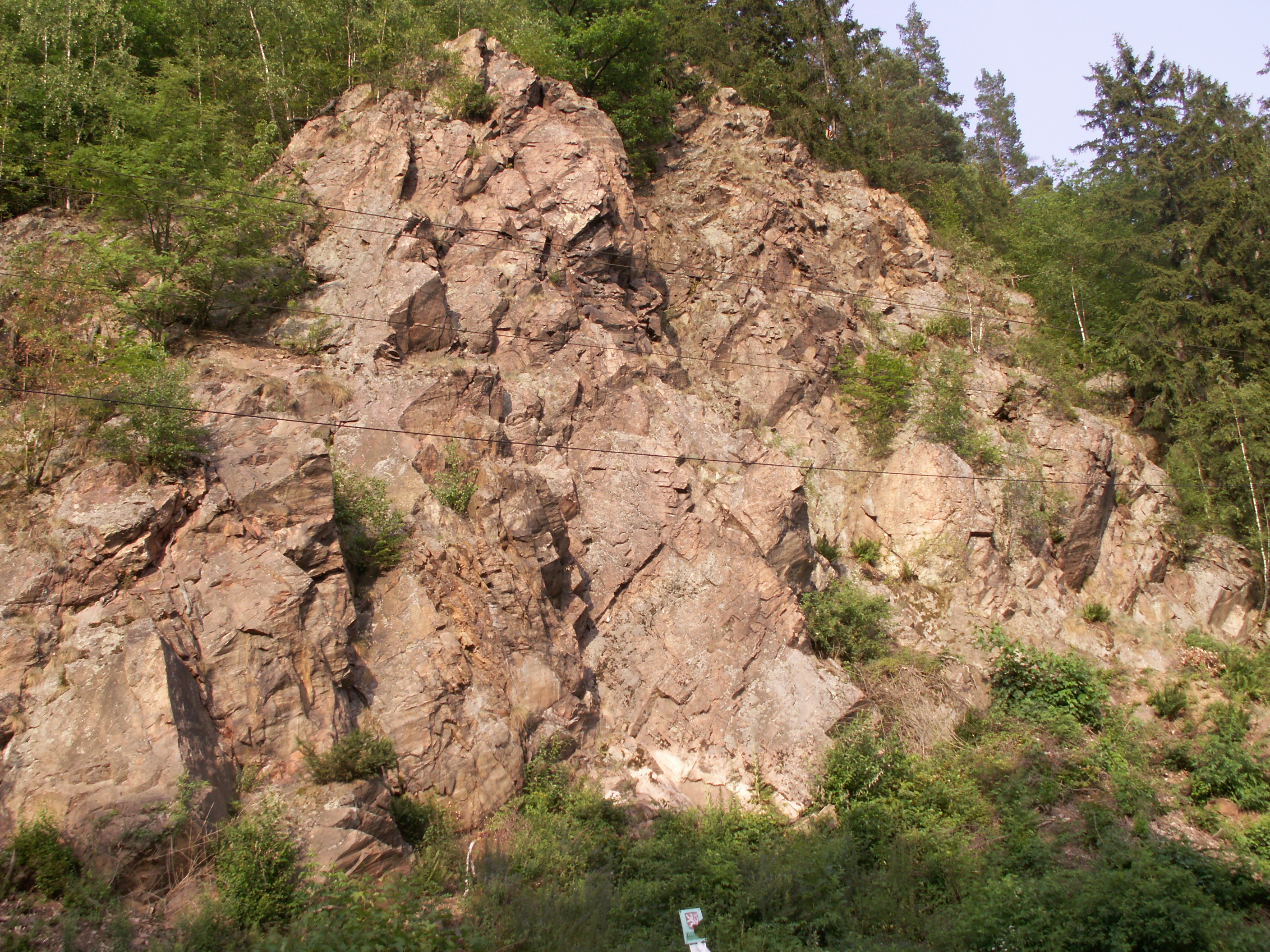 přírodní rezervace "Vírská skalka" u obce Vír, okres Žďár nad Sázavou